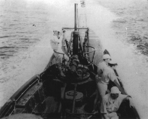 南太平洋を航行中の伊号第十一潜水艦